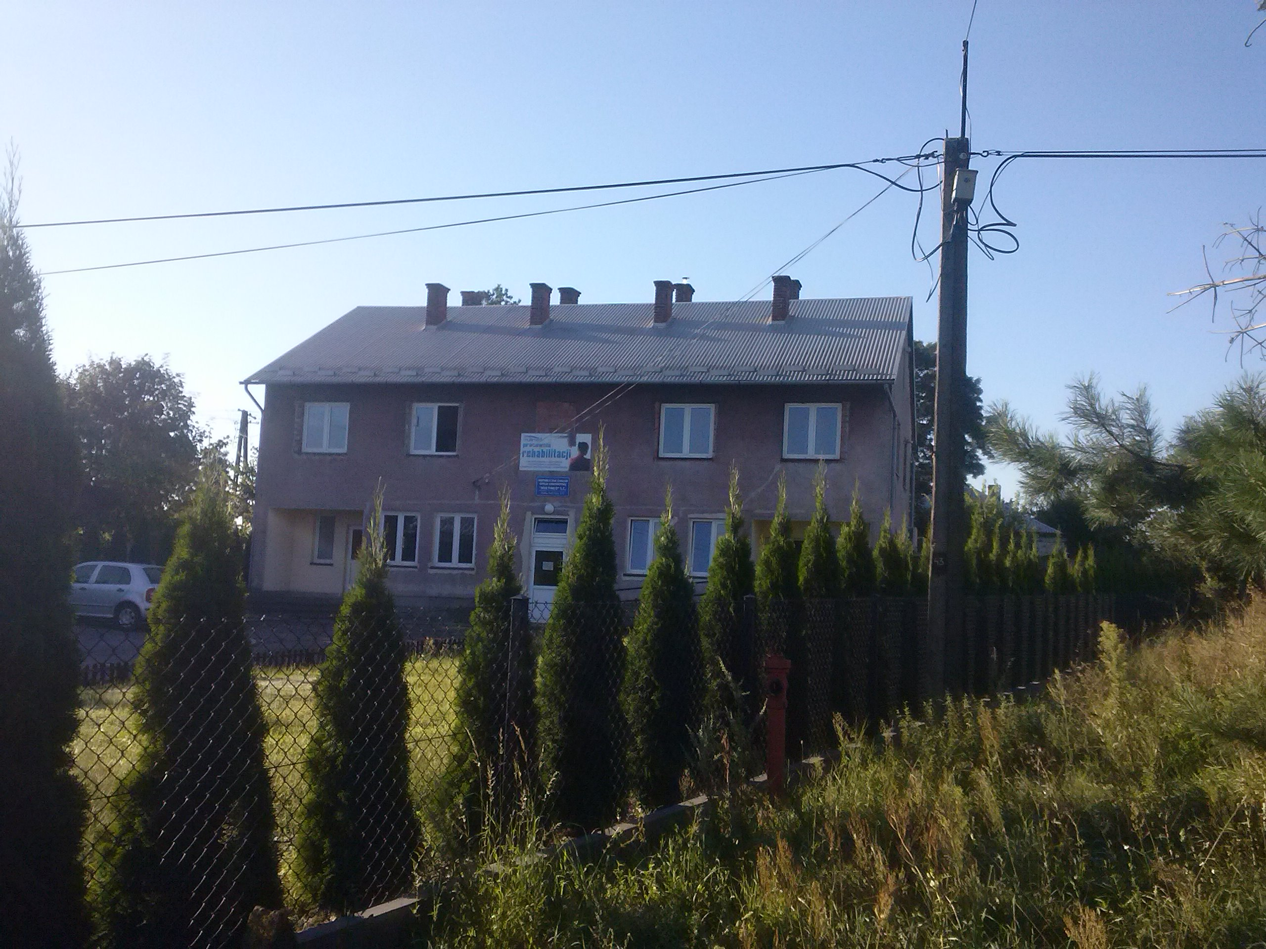 Ośrodek Zdrowia w Wólce Pełkińskiej